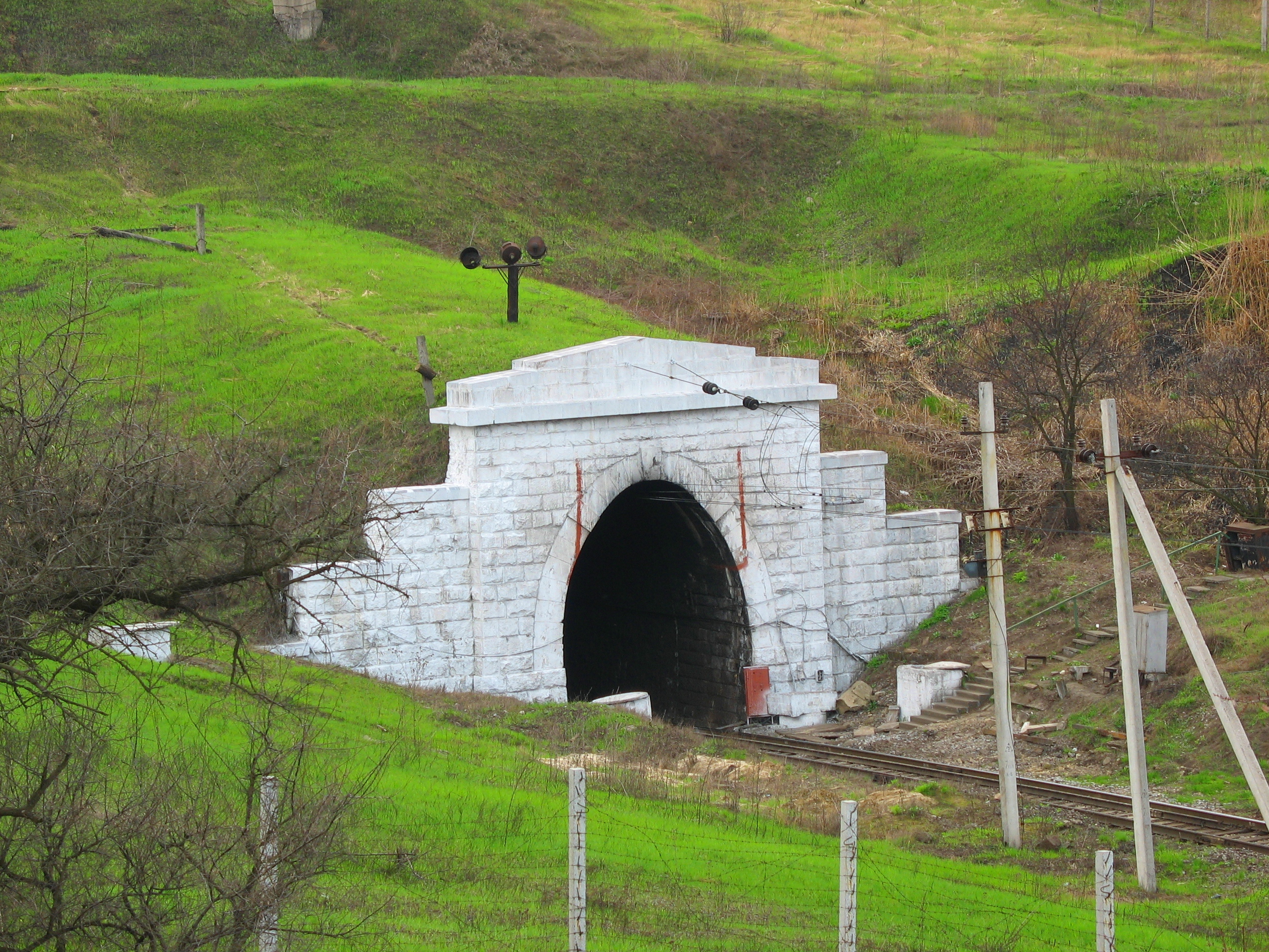 Железнодорожный тоннель на Мерефо-Херсонской ветке, построен в 1929-м году.